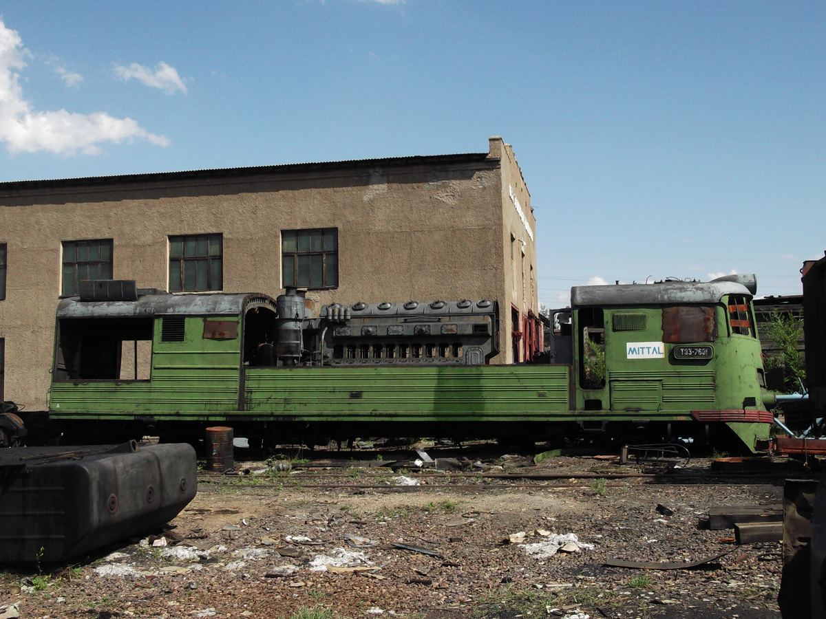 Тепловоз ТЭ3-7601, секция А во время порезки на металлолом. Казахстан, Карагандинская область, депо КПТУ